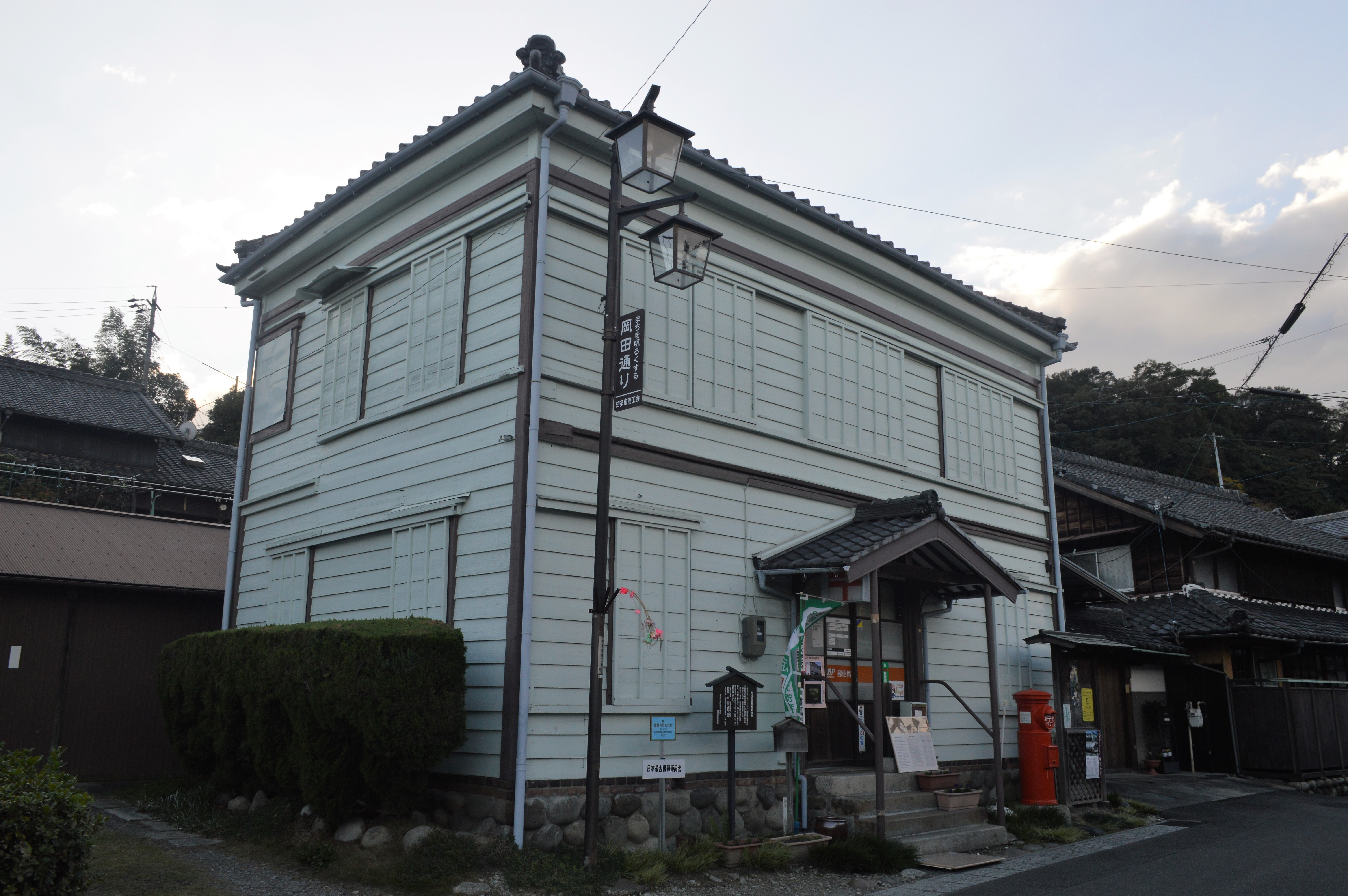 愛知県知多市にある知多岡田簡易郵便局。国の登録有形文化財。